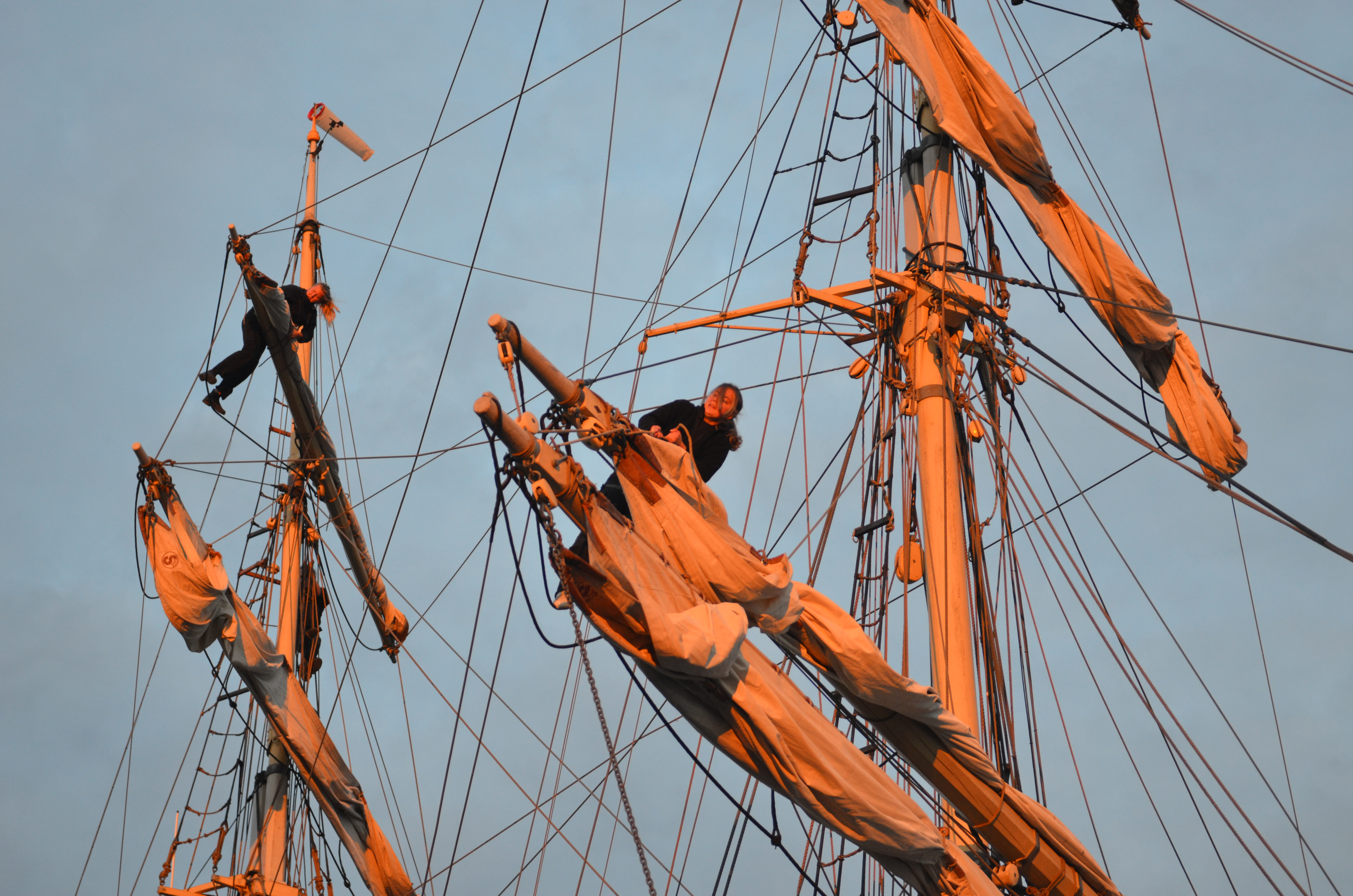 Beslående av segel på briggen Tre Kronor af Stockholm.